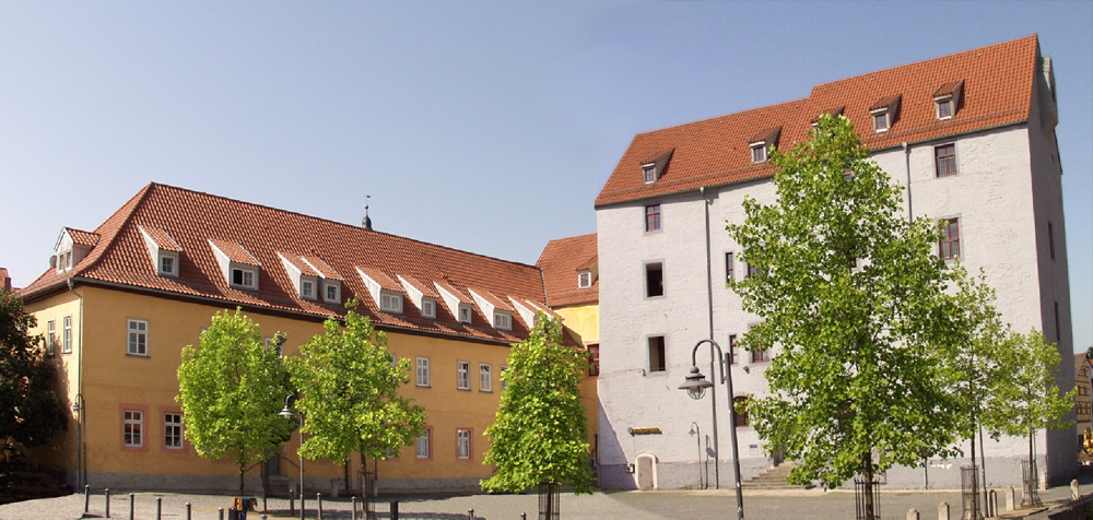 Schloss Dryburg, eine ehemalige Burganlage mit Trockengraben und Vorburg, ist heute das älteste erhaltene Wohngebäude von Bad Langensalza im Unstrut-Hainich-Kreis in Thüringen, ein viergeschossiger Bau über L-förmigem Grundriss.